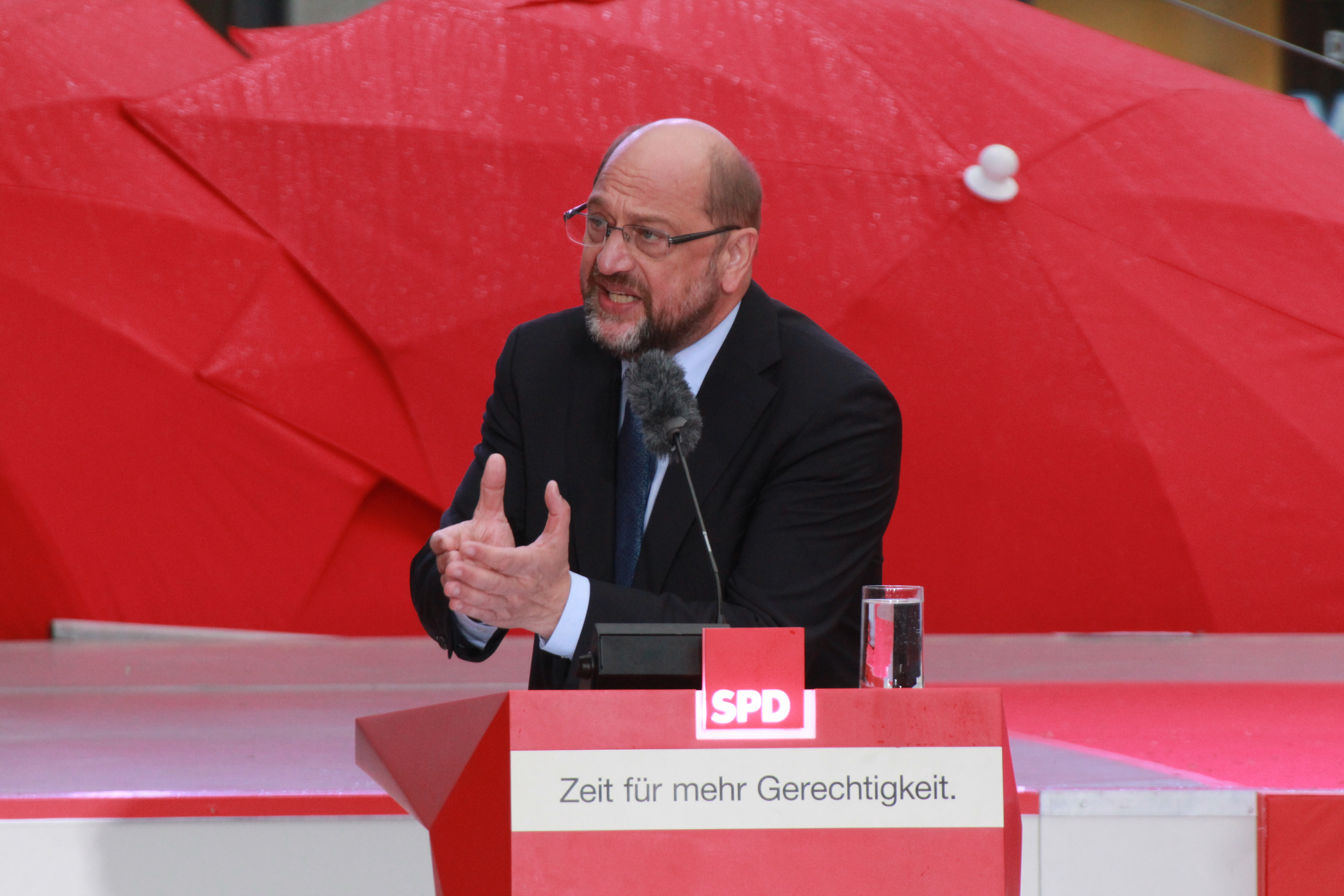 Martin Schulz, SPD-Kanzlerkandidat für die Bundestagswahl 2017, während seiner Rede bei einem Wahlkampfauftritt am 6. September 2017 in der Stubengasse in Münster.